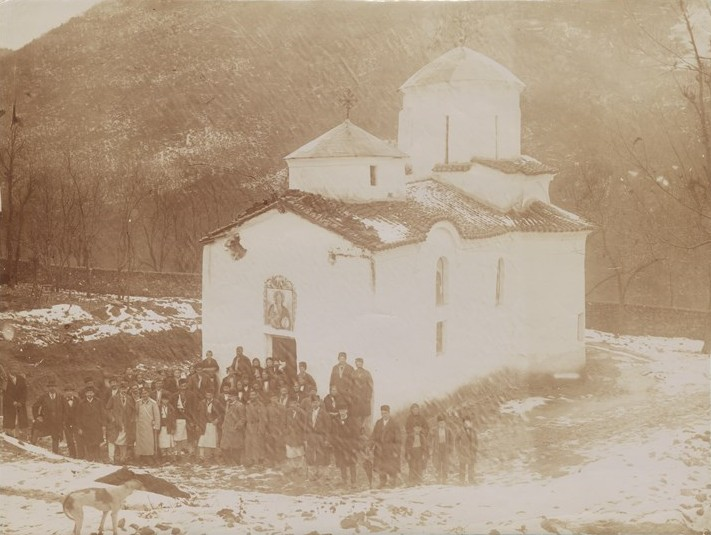 Манастирът „Св. Архангел Михаил“ край Трън.